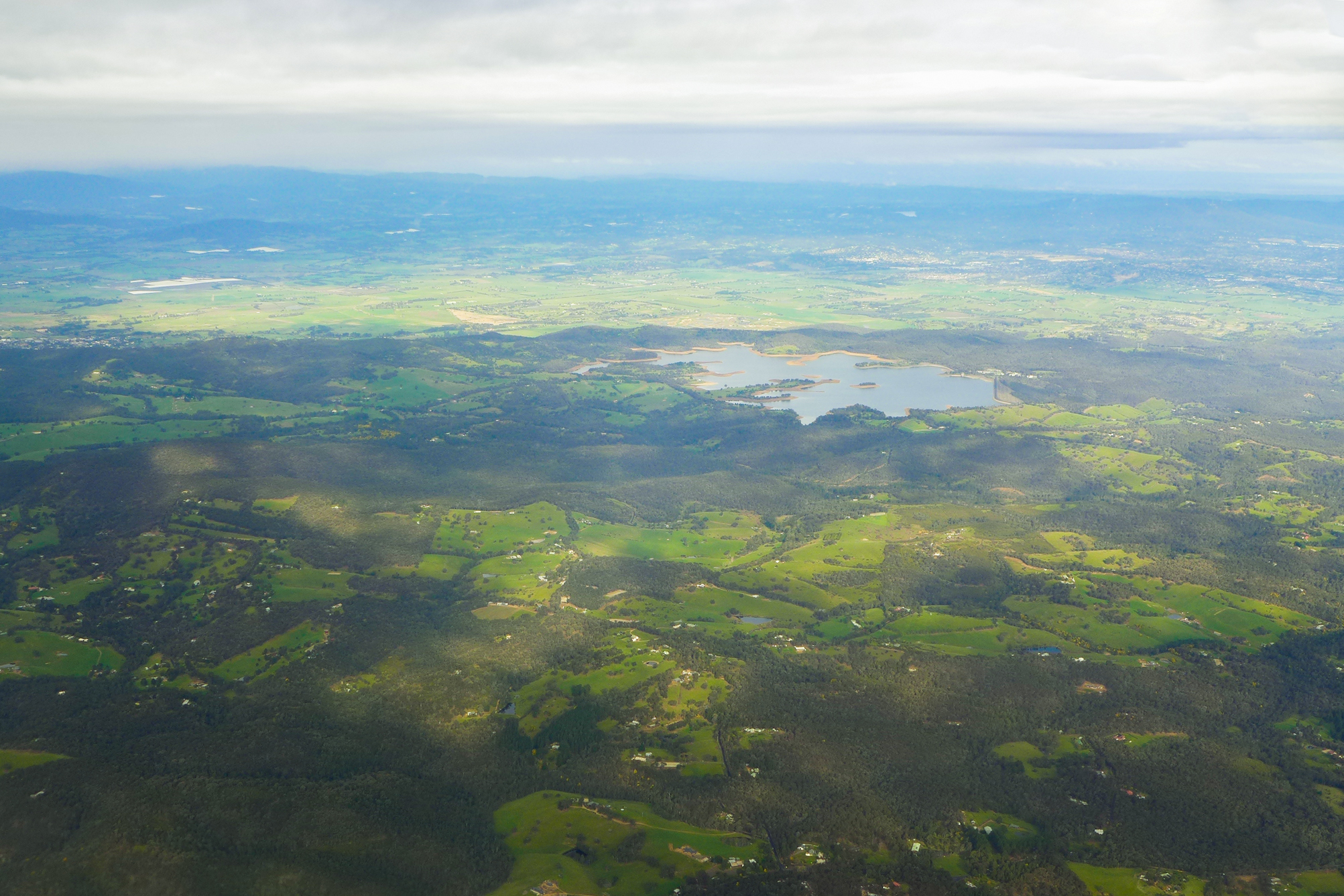 Panton Hill, VIC